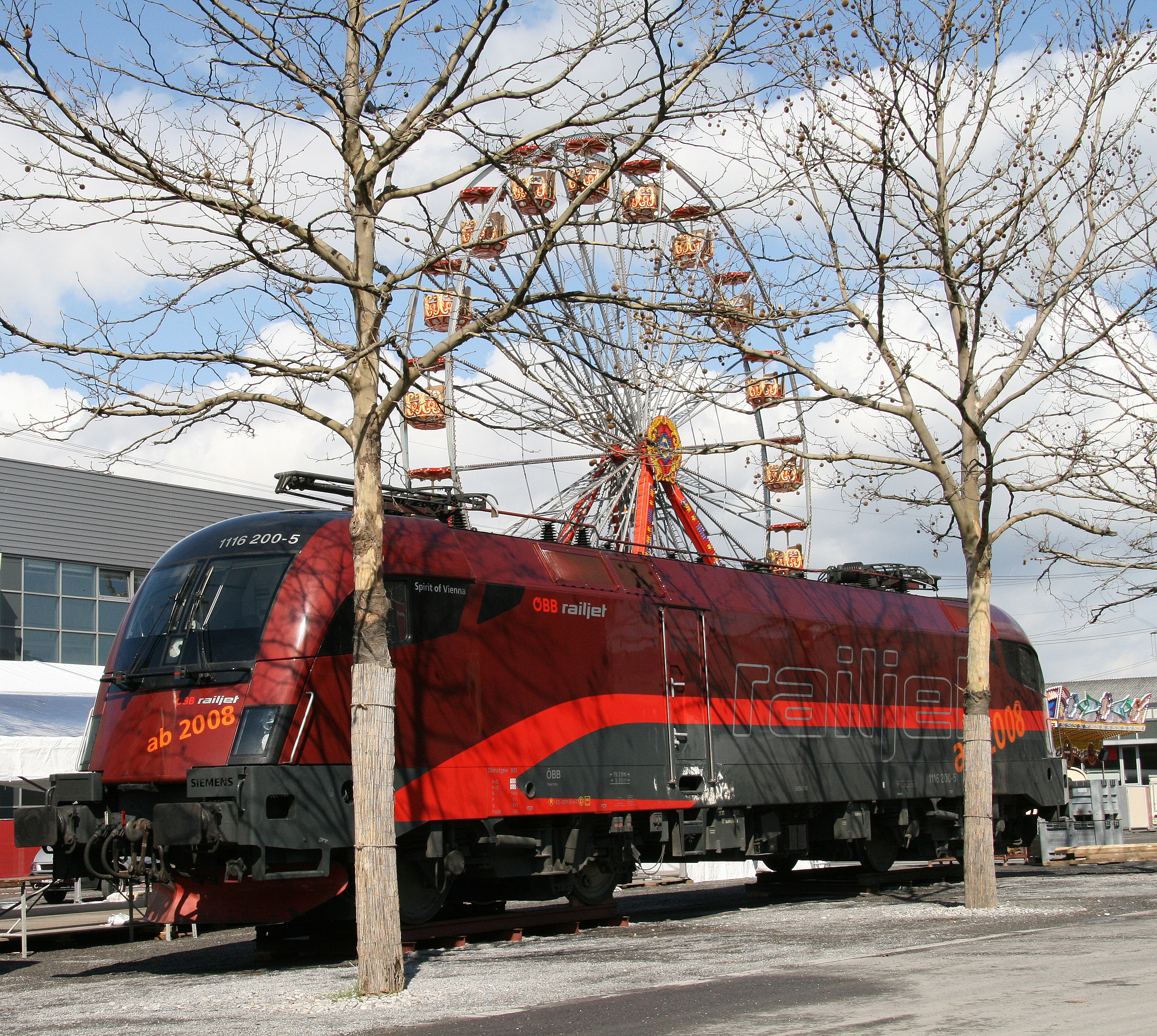 ÖBB Hochleistungslok TAURUS - 1116 200-5 (railjet mit Sonderlackierung). Siemens ES 64 U2 Dauerleistung: 6.400 kW; Kurzleistung: 7000 kW; Stromsysteme: 15.000 V, 16,7 Hz bezw. 25.000 V, 50Hz; Höchstgeschwindigkeit 230 Km/h; Dienstgewicht 86 t; Länge über Puffer: 19.280mm; Maximale Zugkraft: 300kN; Achsfolge: Bó Bó; gesehen auf der Dornbirner Frühjahrsmesse 2008 in Vorarlberg